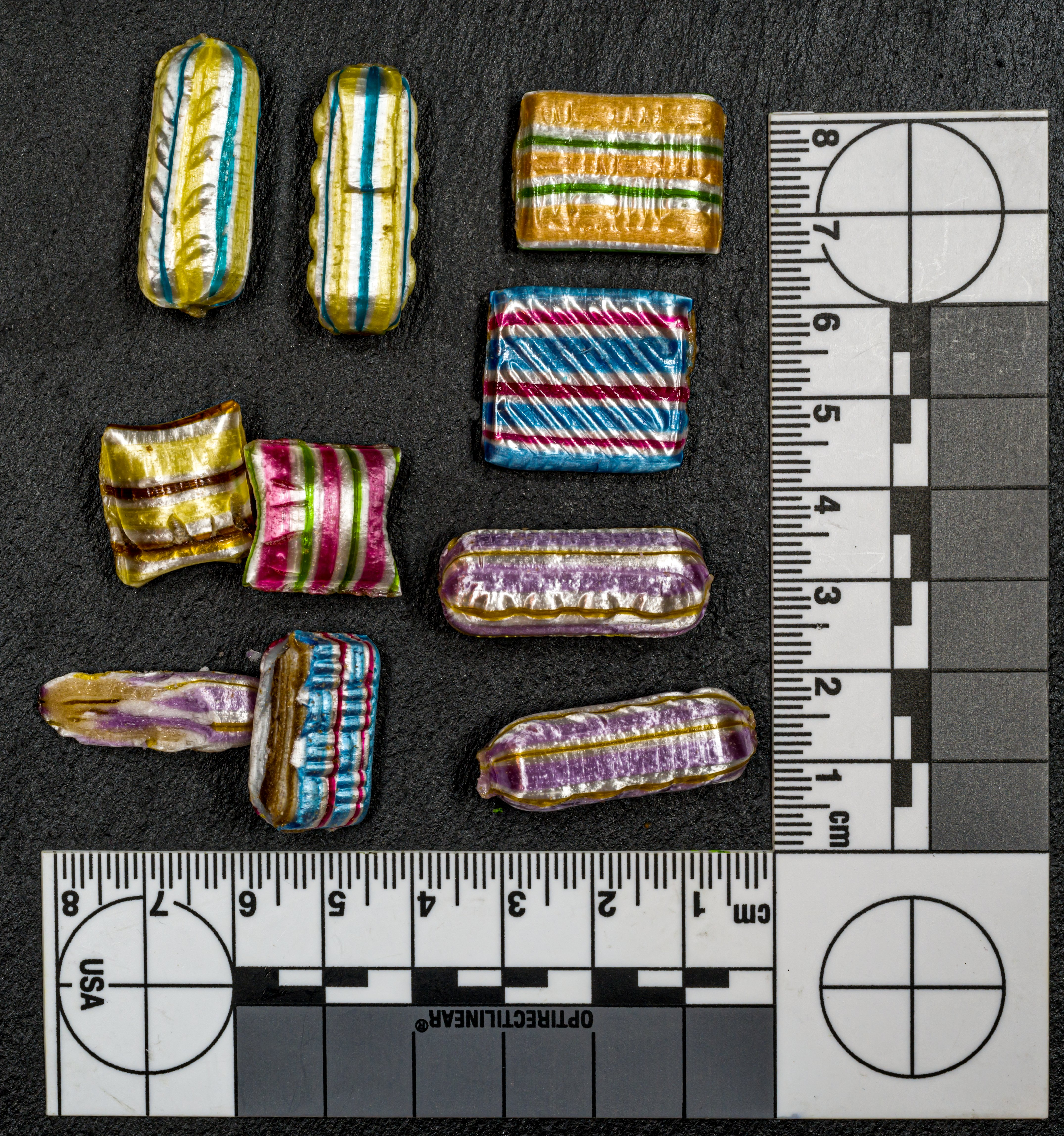 Bonbons Das Bonbon besteht aius Schokoladen und Zuckerschichten. Die Oberfläche ist eine bunte Zuckerschicht.